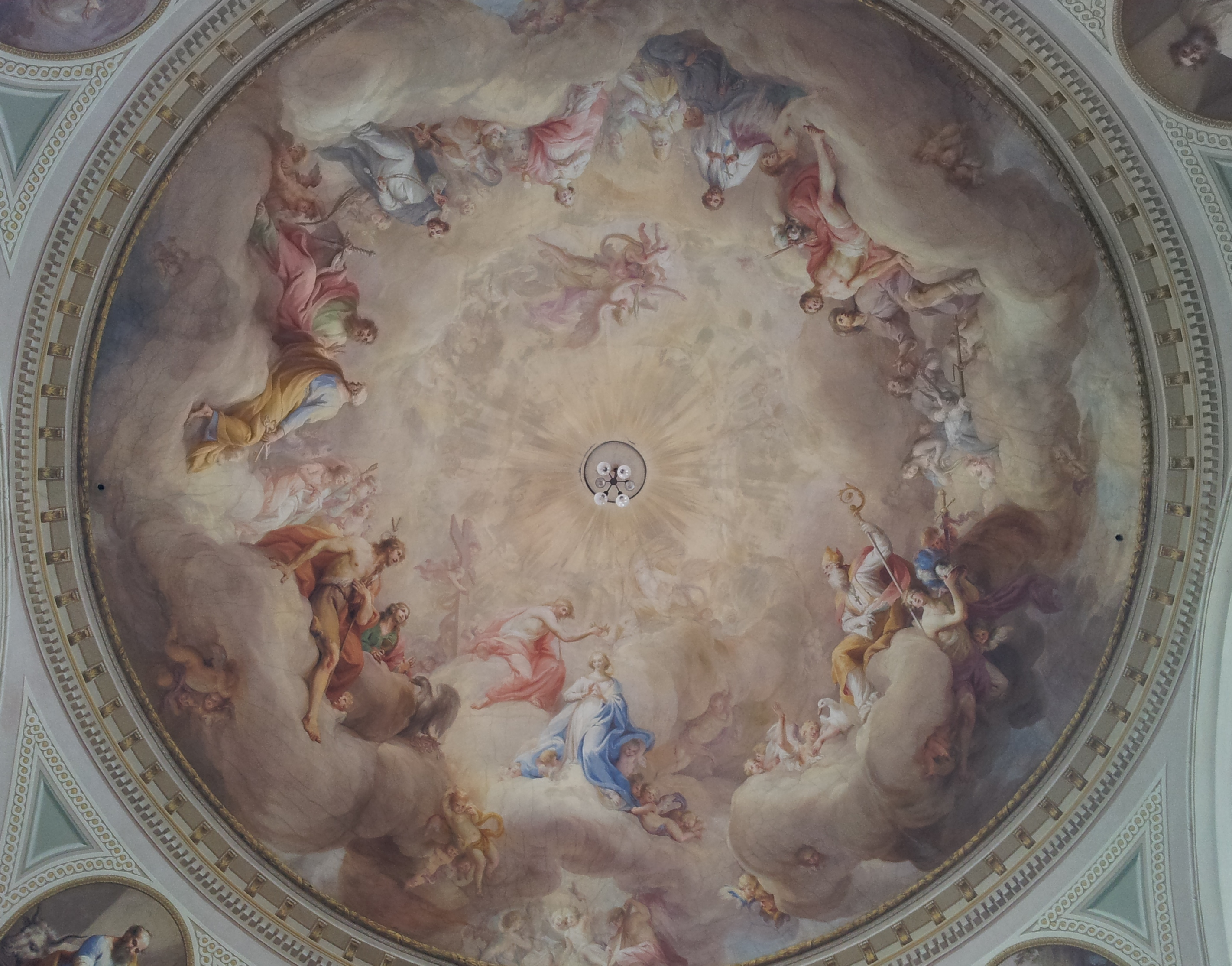 Hauptkuppel der Dekanatspfarrkirche Brixen im Thale